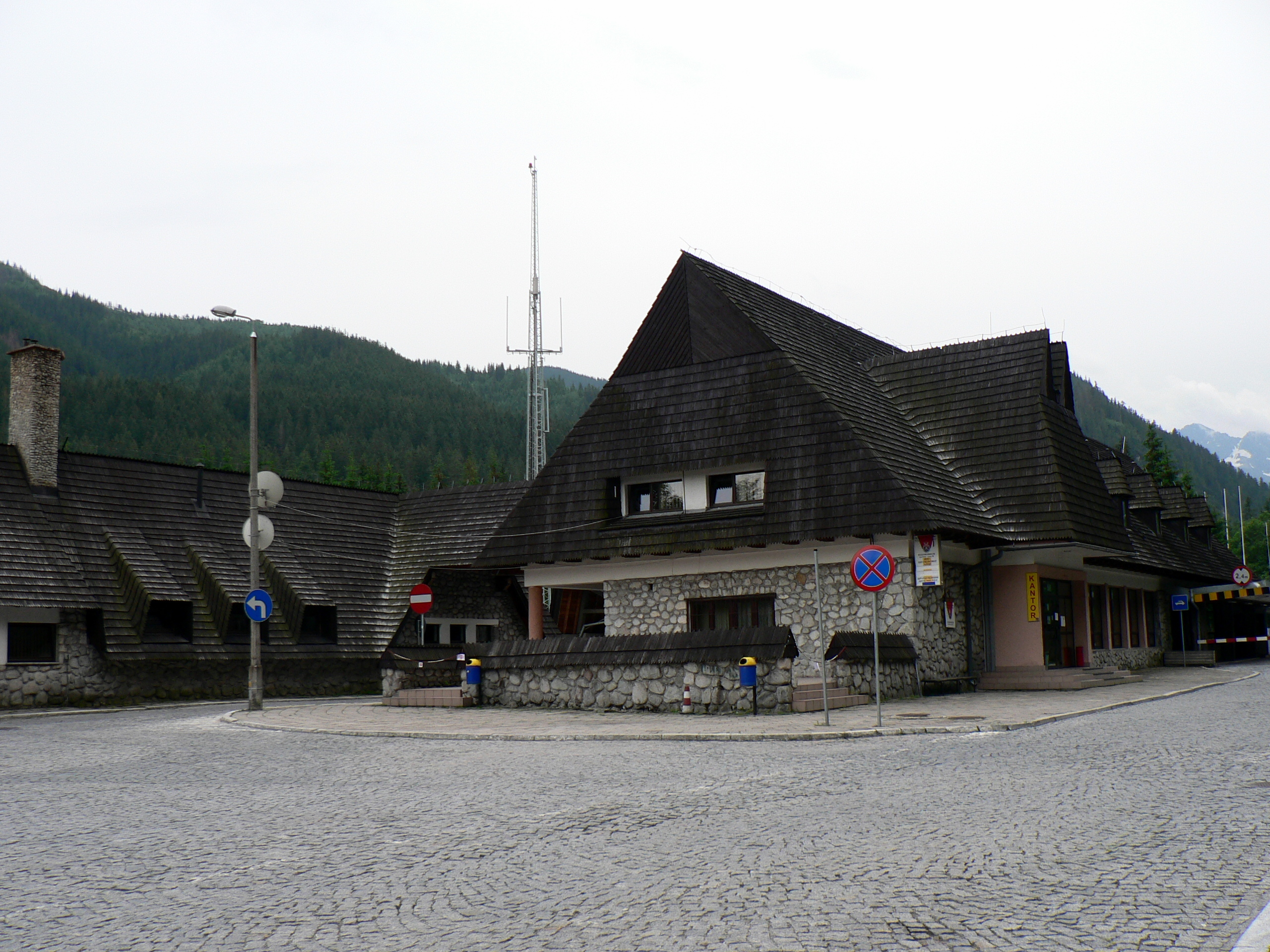 Przejście graniczne Łysa Polana-Tatranská Javorina, między Polską, a Słowacją